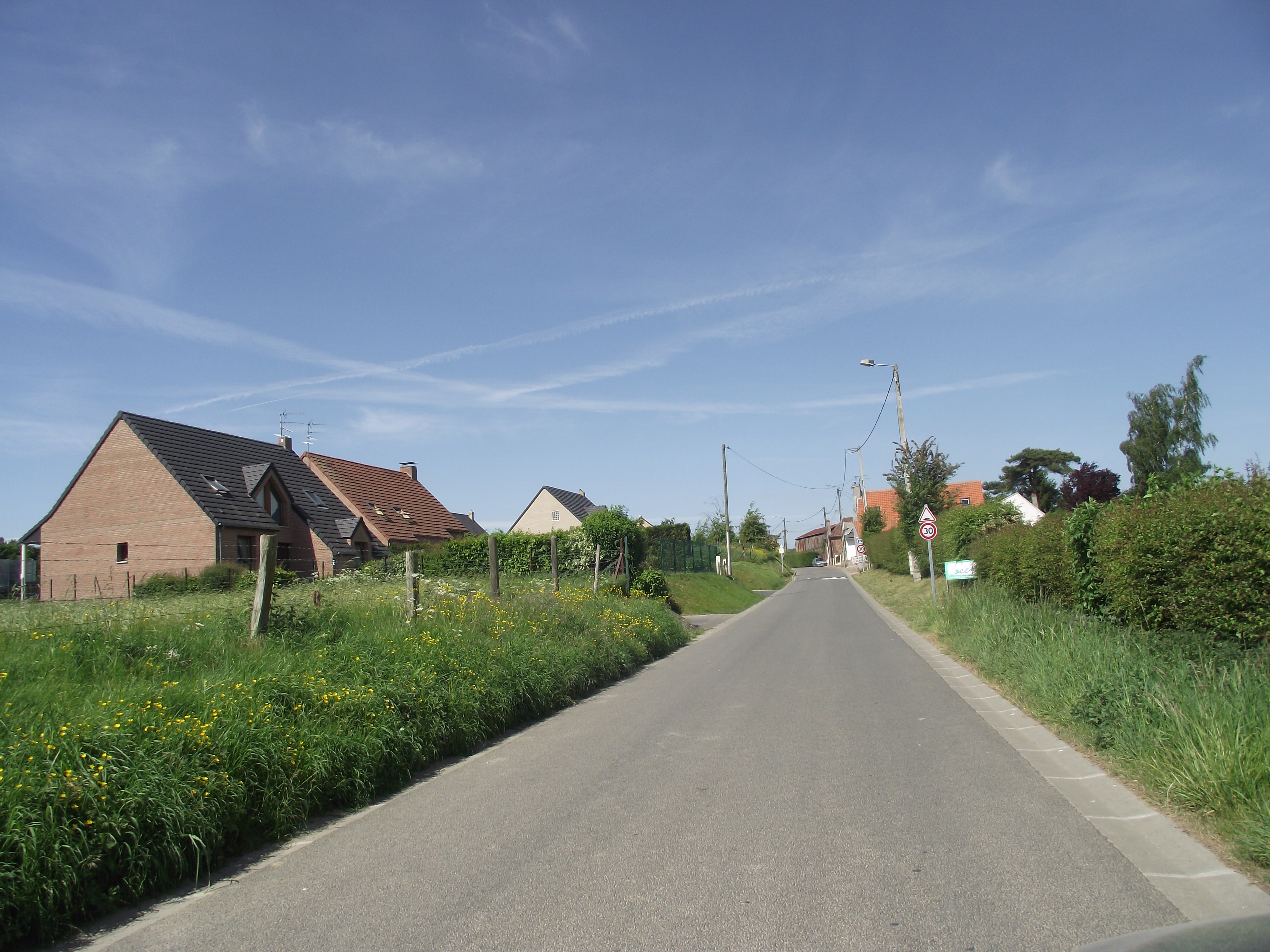 L'entrée de Saint-Martin-sur-Écaillon